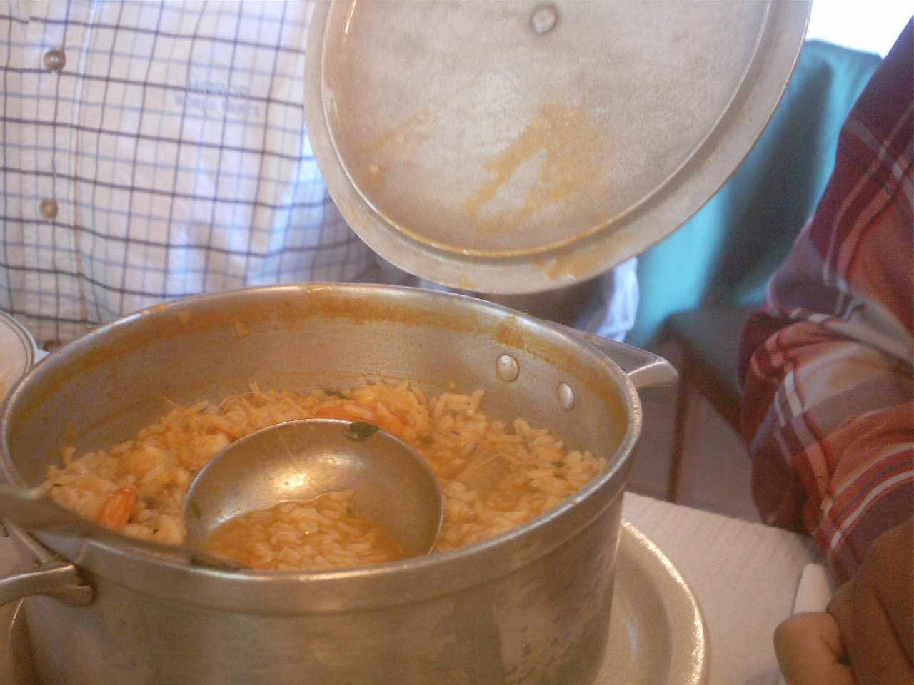 Arroz de Marisco, um prato português (a dish from Portugal).